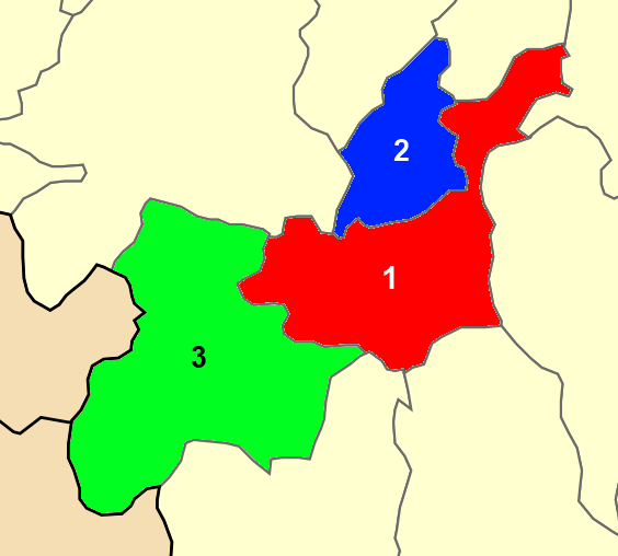 Χάρτης των ενοτήτων (και πρώην δήμων) από τις οποίες αποτελείται ο Δήμος Λαρισέων